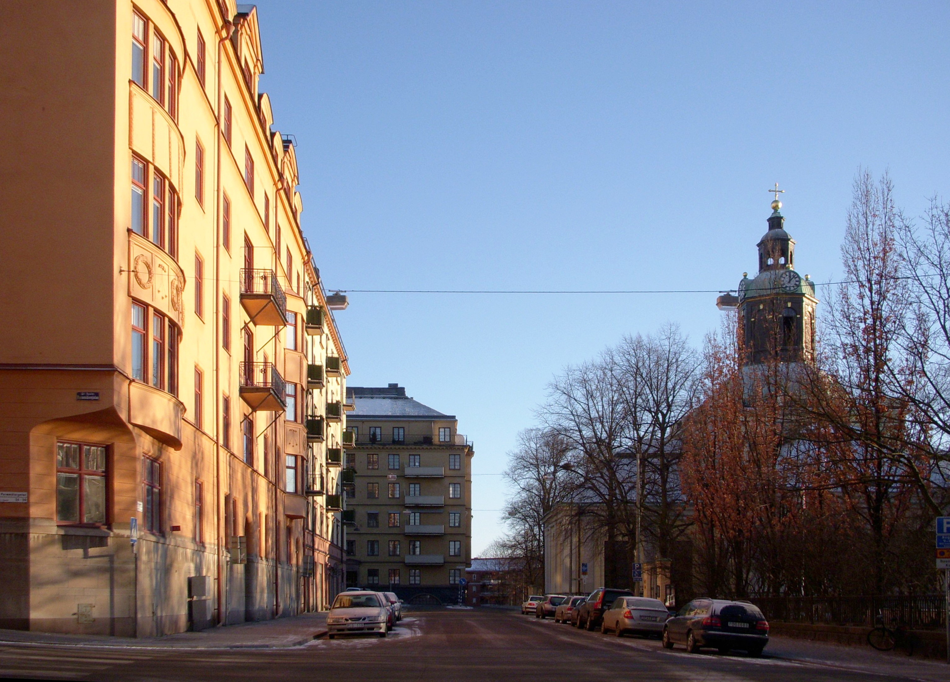 Bergsgatan på Kungsholmen i Stockholom